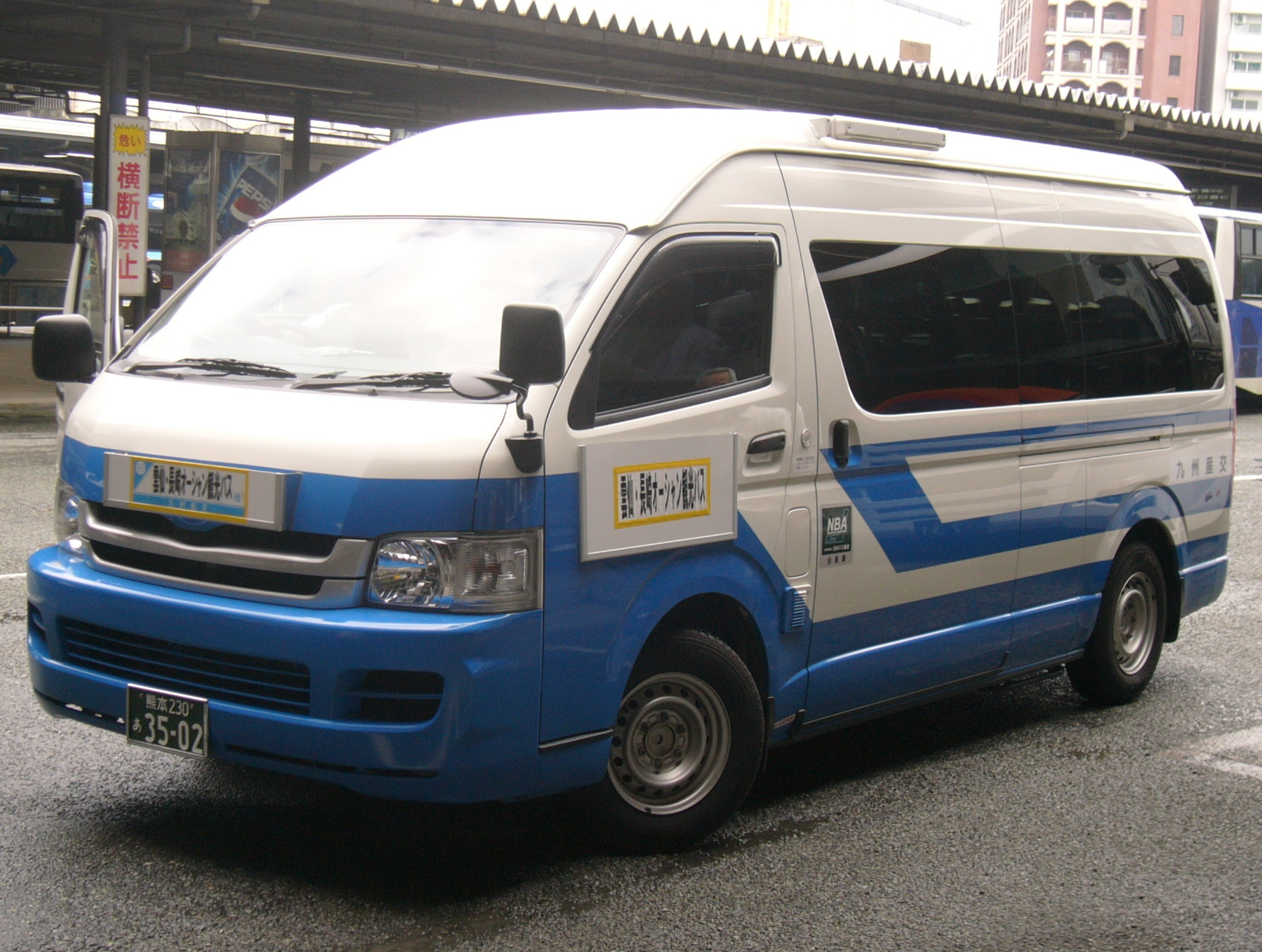 撮影場所：熊本交通センターにて